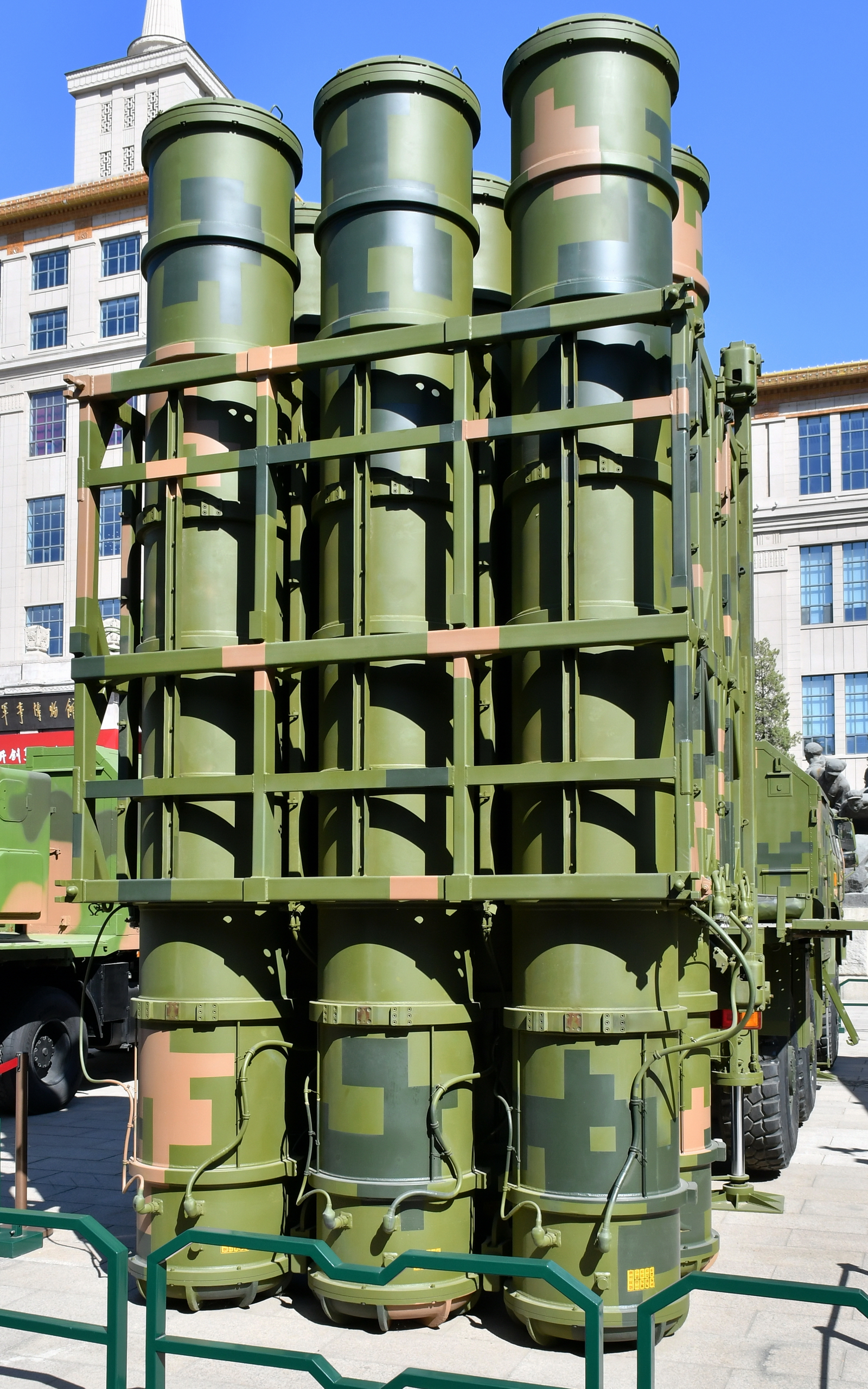 红旗-16防空导弹，拍摄于中国人民革命军事博物馆。